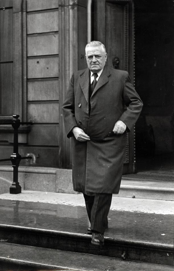 Schouten, J. ( ARP). Kabinetscrisis 1955. Dr. J. Schouten, ontvangen door de koningin op het Lange Voorhout. Nederland, Den Haag, 20 mei 1955.